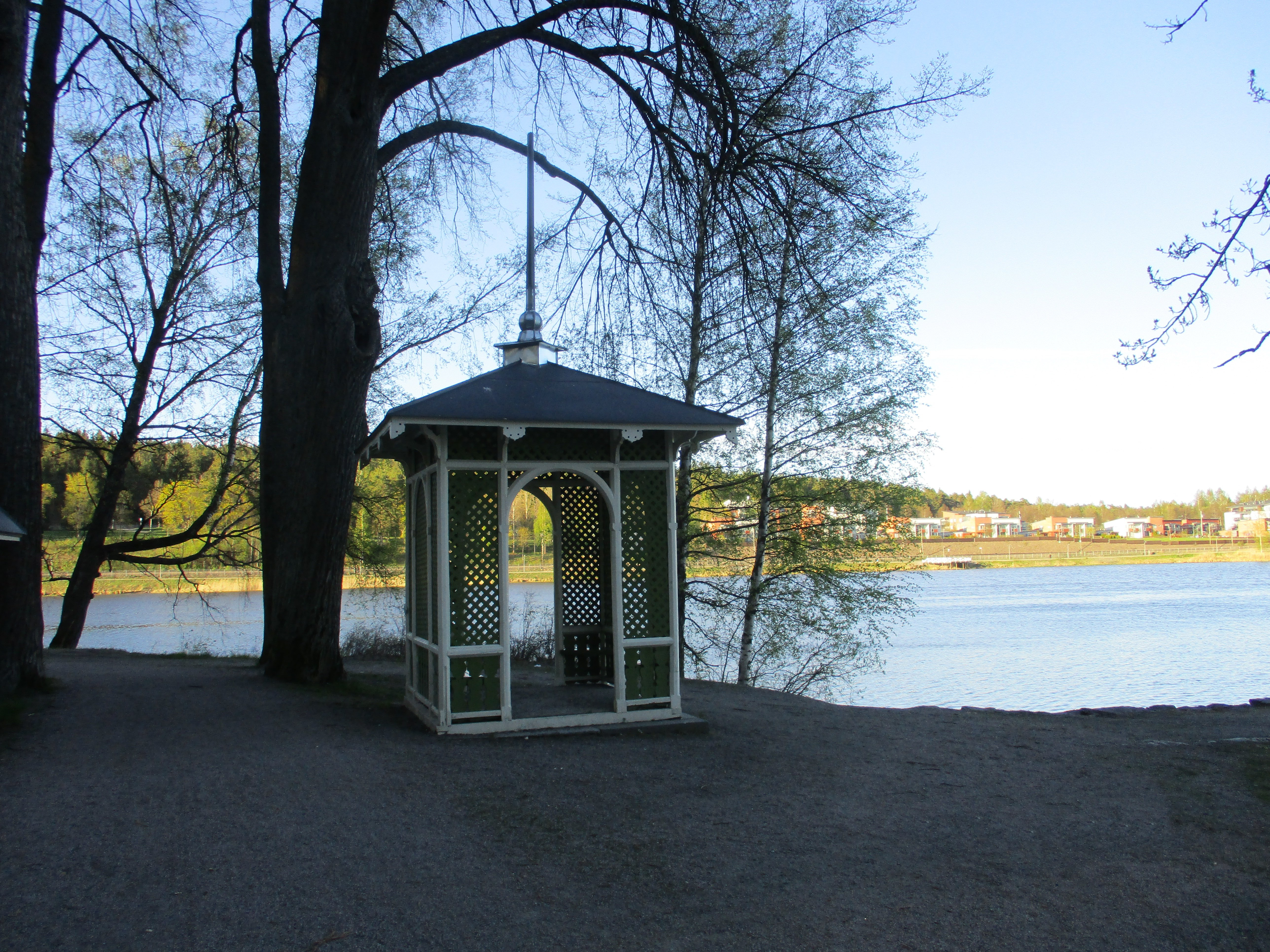 Hämeenlinnan kaupunginpuisto; rakennettu kulttuuriympäristö Hämeenlinnassa